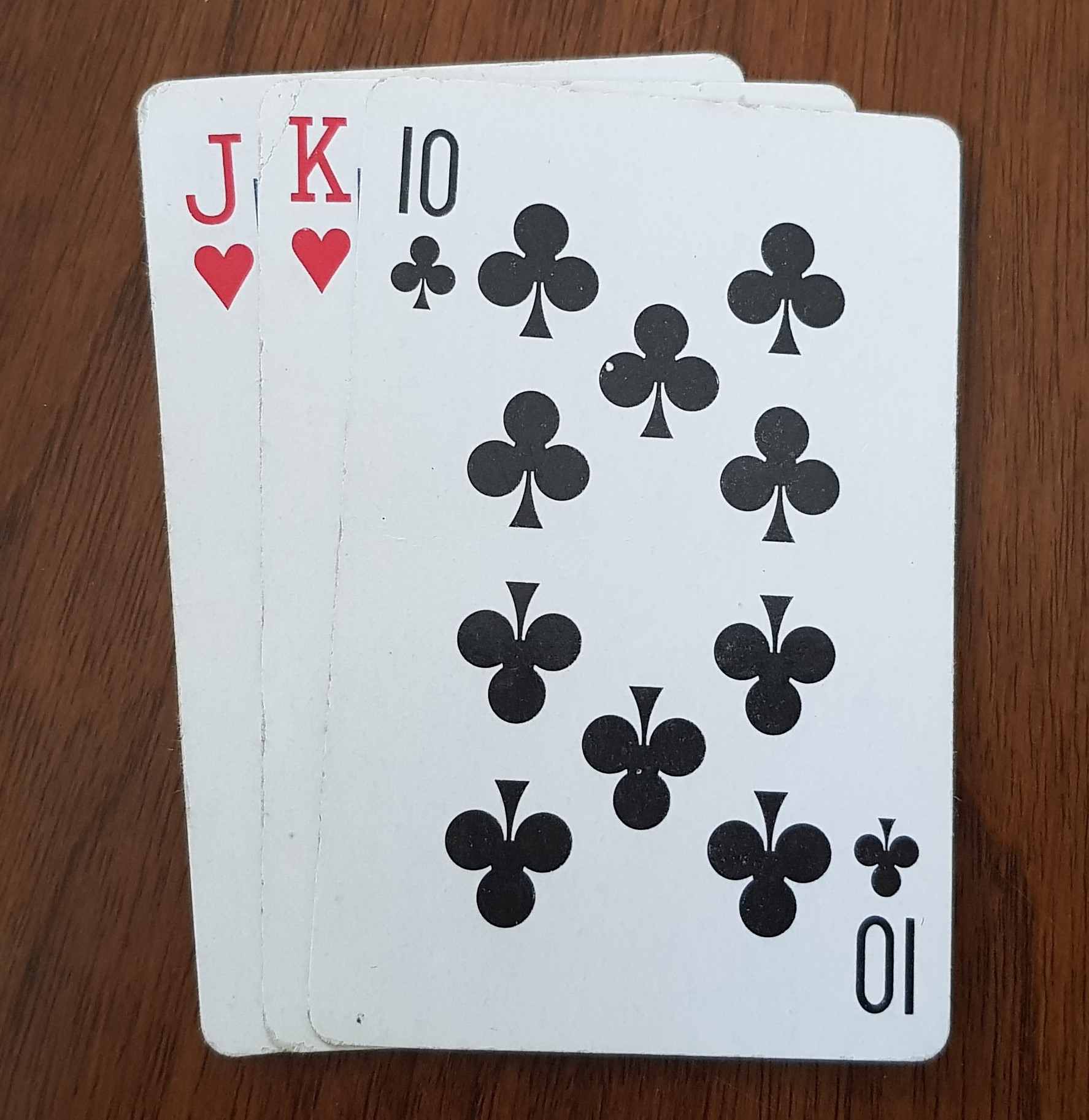 Chlust z dwóch kart tego samego koloru i dziesiątki żołądź, która zastępuje kartę w kolorze serce.